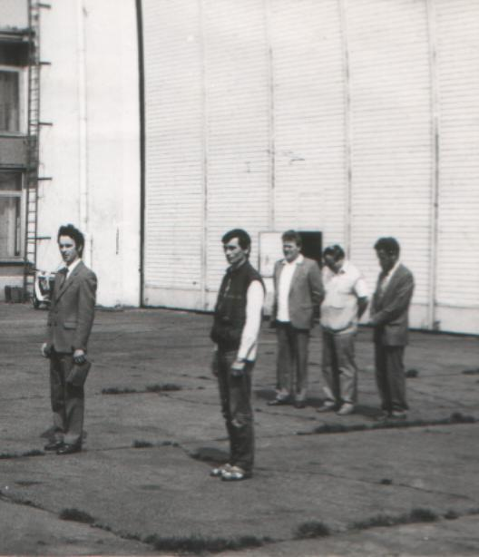 XIX Spadochronowe Mistrzostwa Śląska 1988. Uroczyste otwarcie mistrzostw. W bezrękawniku Jan Isielenis - Sekcja Spadochronowa Aeroklubu Gliwickiego